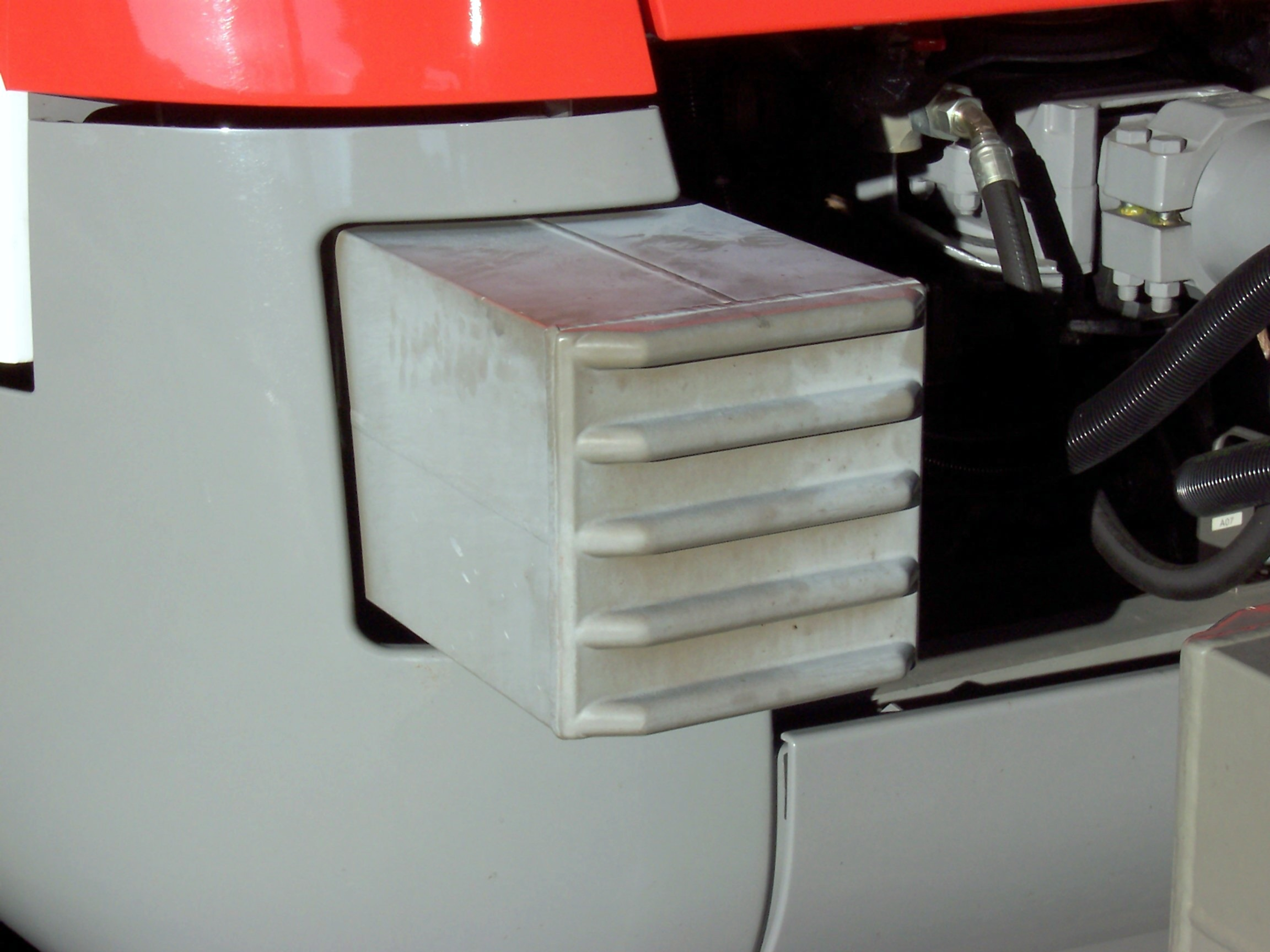 Bildbeschreibung/Description: CRASH-Puffer ITINO Bombardier Transportation Quelle/Source: selbst fotografiert/self taken Photo Fotograf/Photographer: Markus Flath Datum/Date: 11.12.2005 Deutschland/Germany